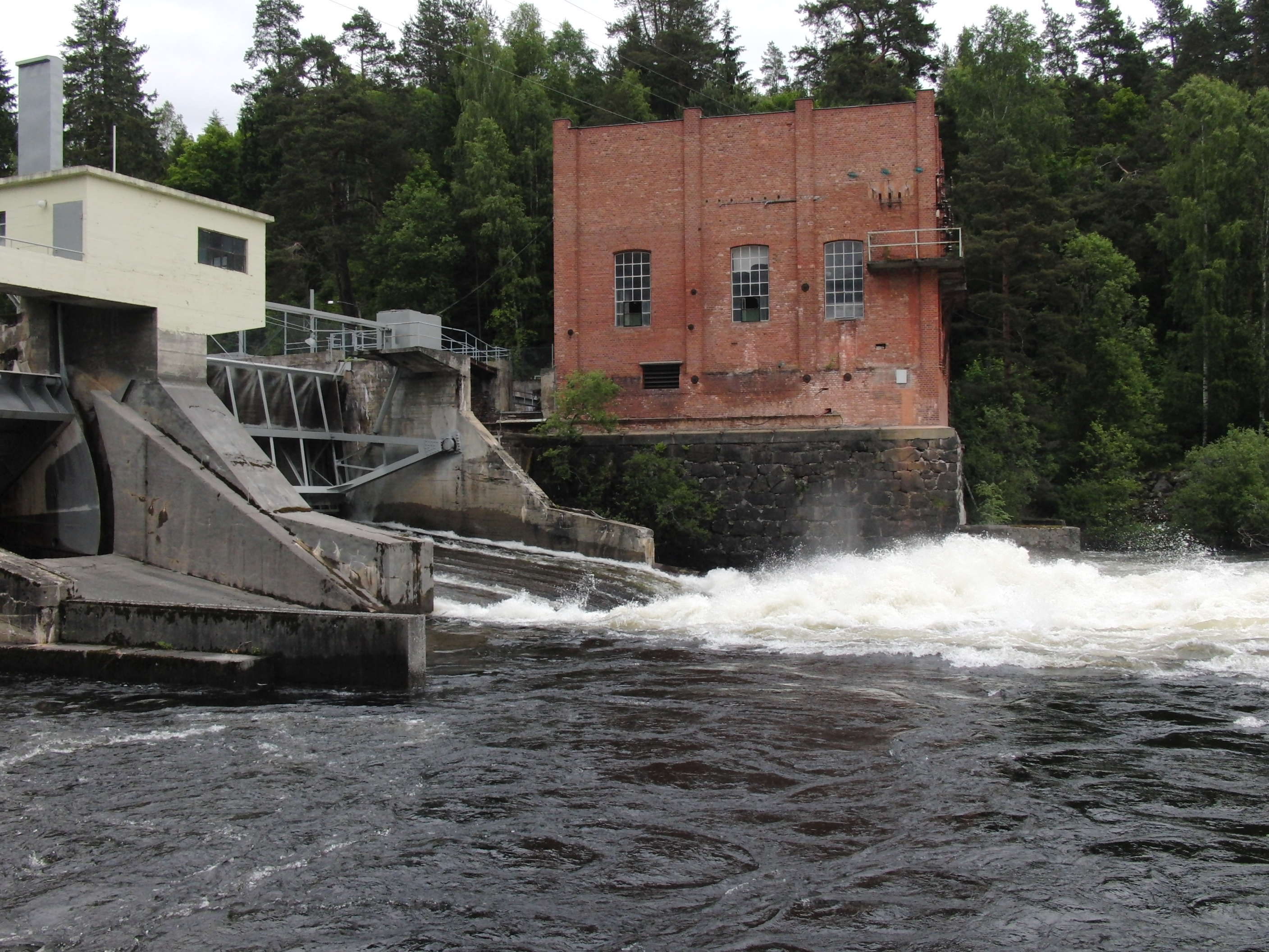 Bergerfoss I kraftverk